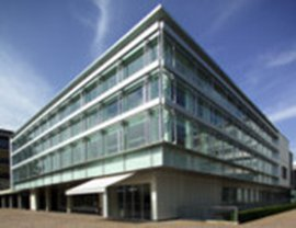 Hauptbibliothek UZH FBI